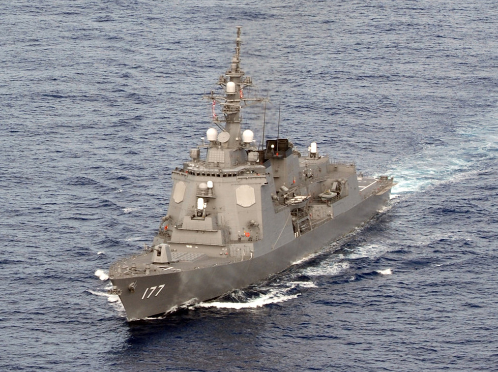 日米共同統合演習 「キーン・ソード2013」 の終了後、東シナ海を航行する護衛艦あたご。